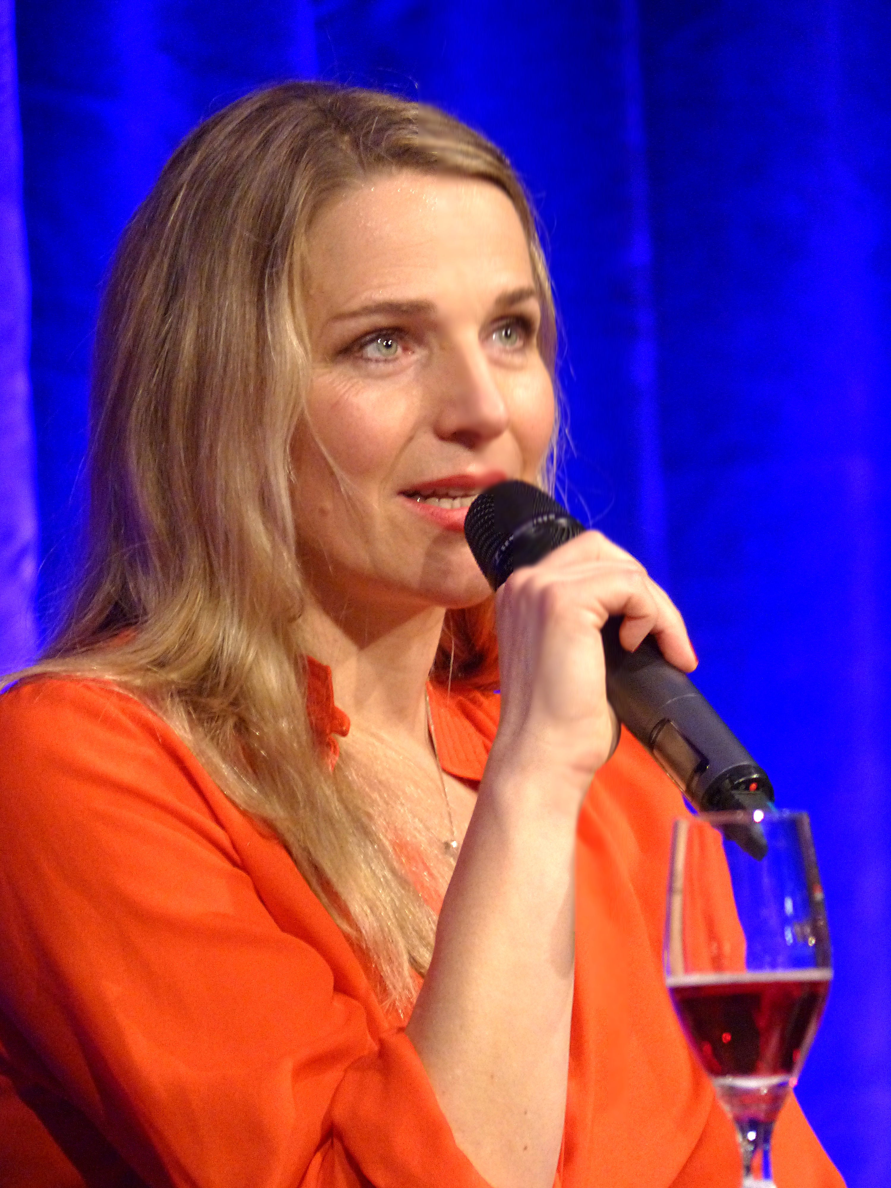 Tanja Wedhorn bei der Tourpremiere des Theaterstücks "Eine Sommernacht" am 9.02.'15 in Iserlohn.